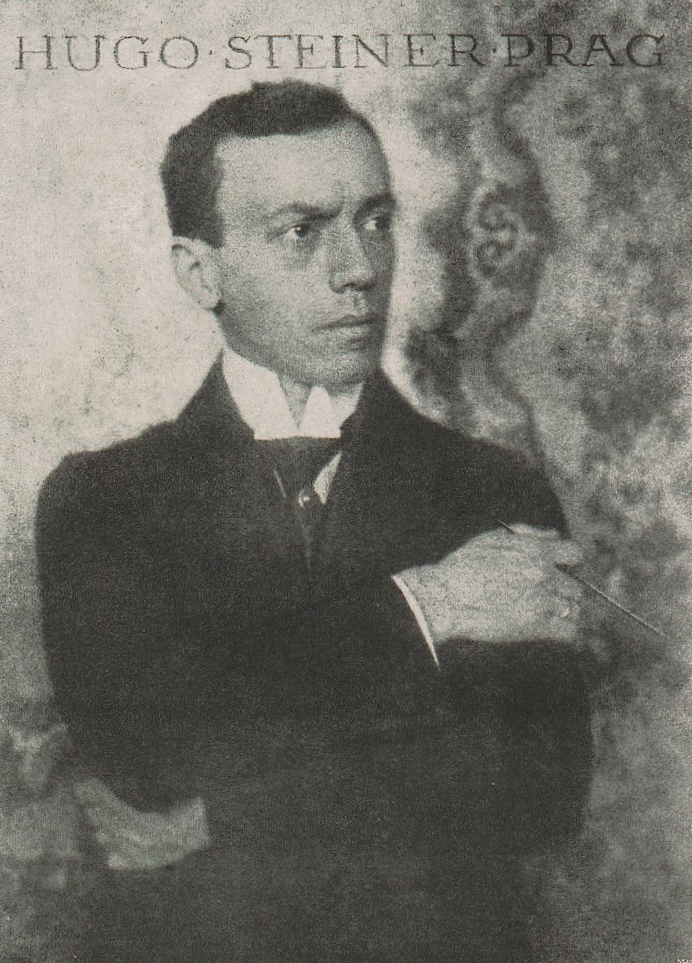 Portrait des Künstlers Hugo Steiner-Prag